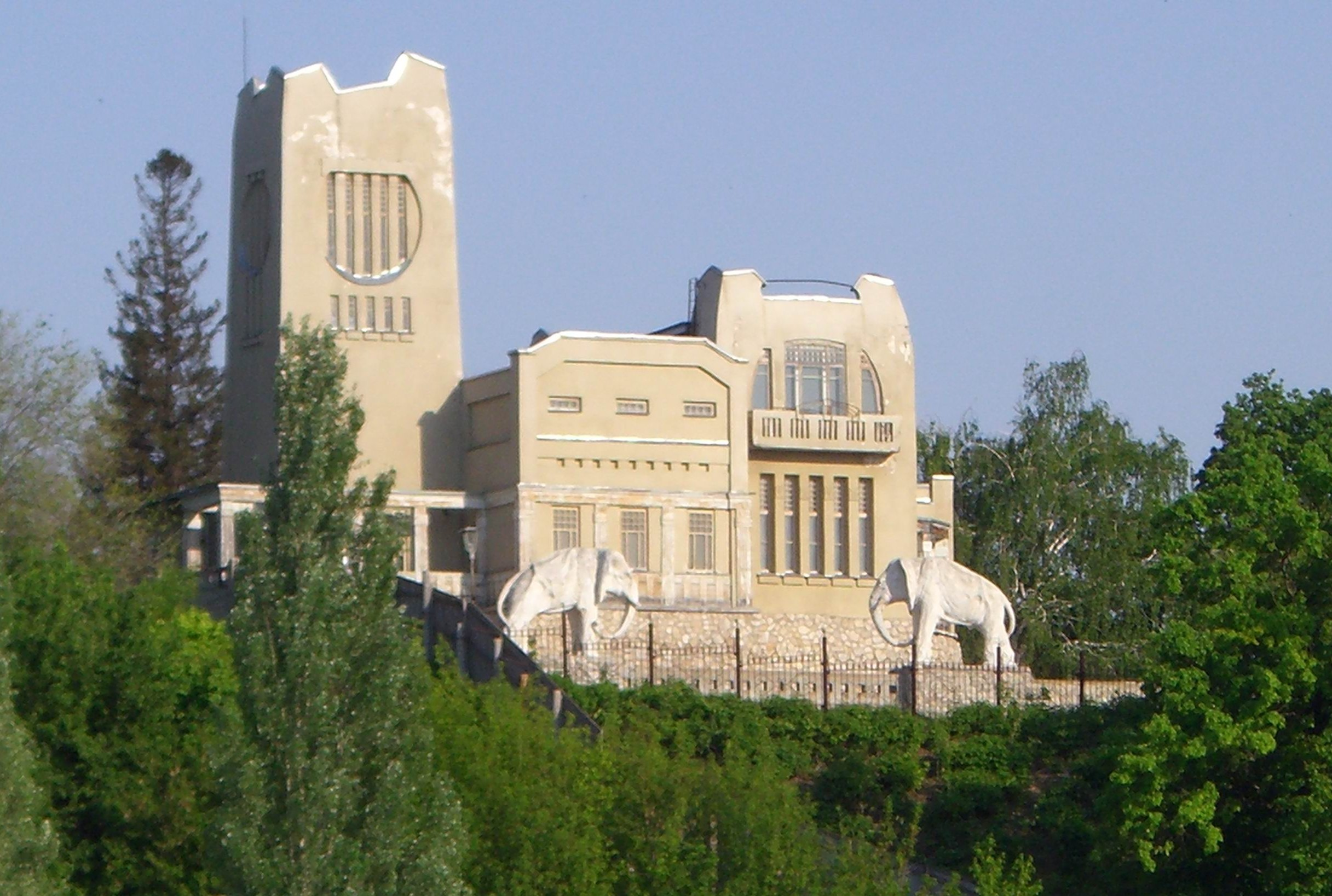 Дача Головкина. Знаменитая «Дача со слонами». Здание в стиле модерн